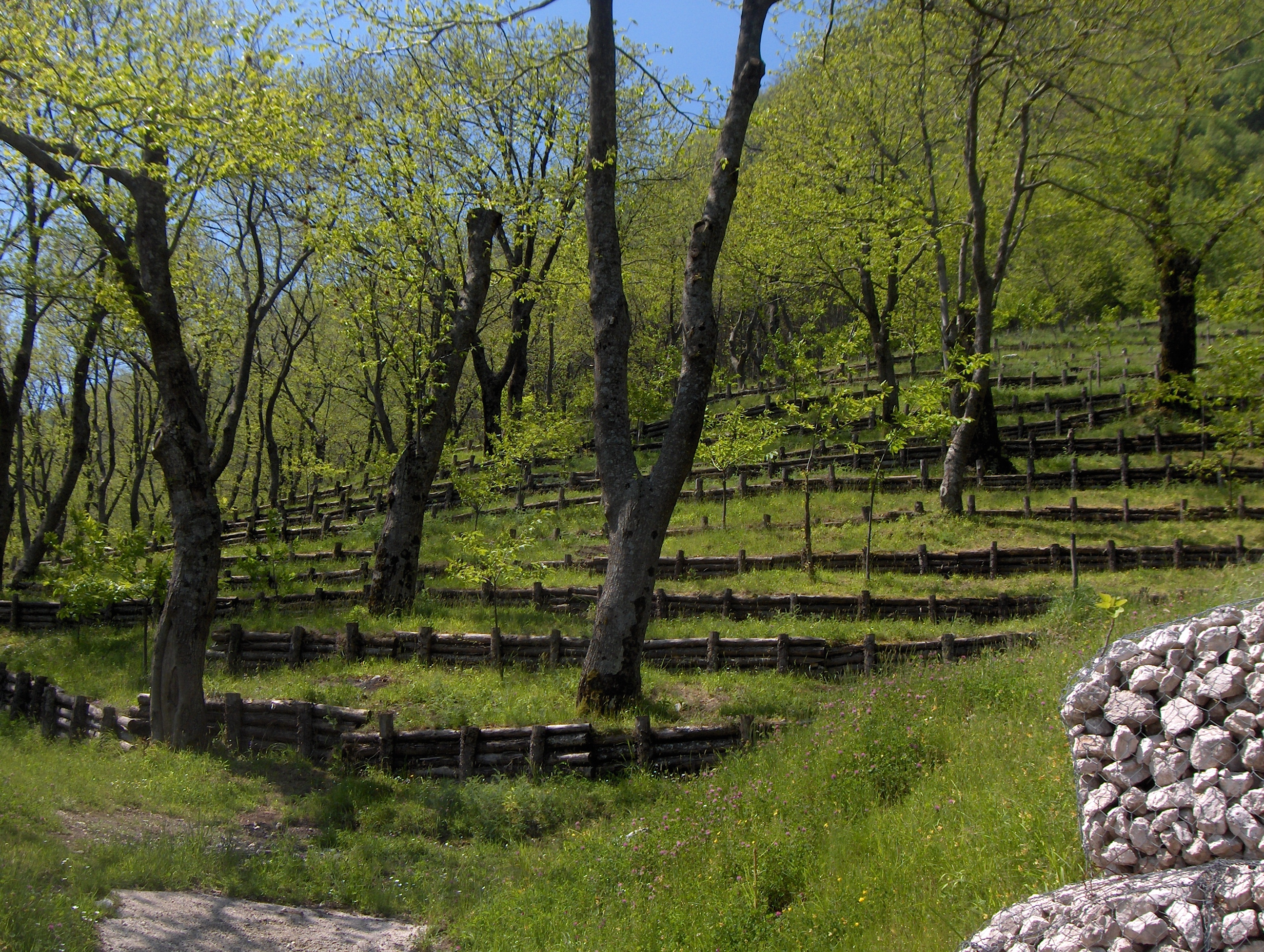 Ecco gli scaloni costriuti per contenere il terreno dello smottamento verificatosi a Contrada il 4 marzo 2005